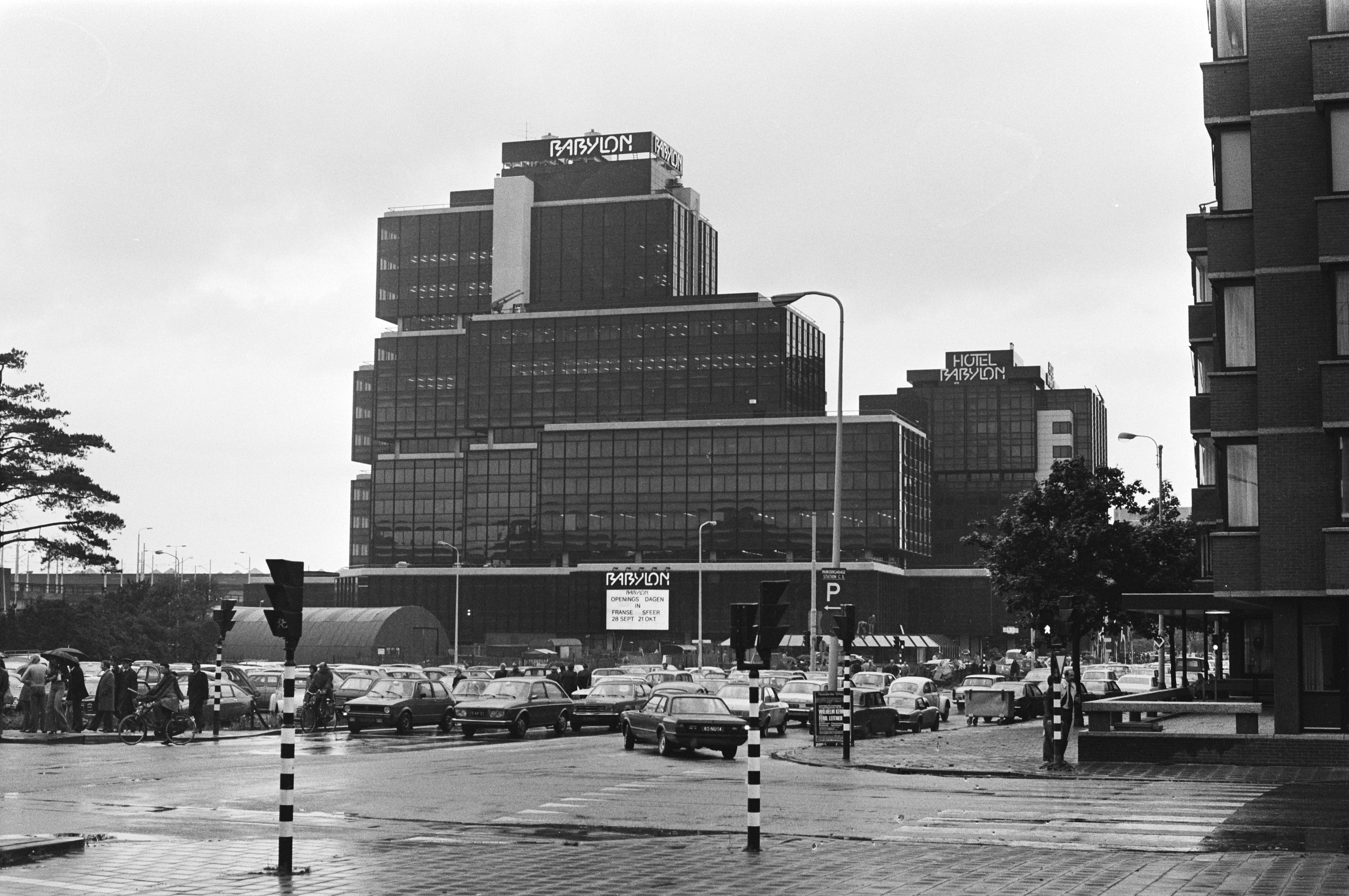 Het oude Babylon van W.Th. Ellerman van architectenbureau Lucas & Niemeijer